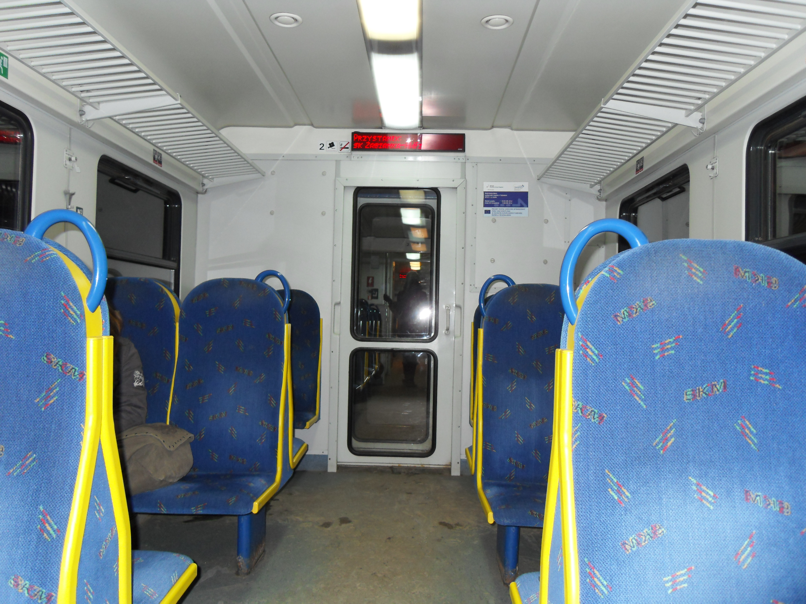 EN57 Trójmiasto - wnętrze, wieczorem.